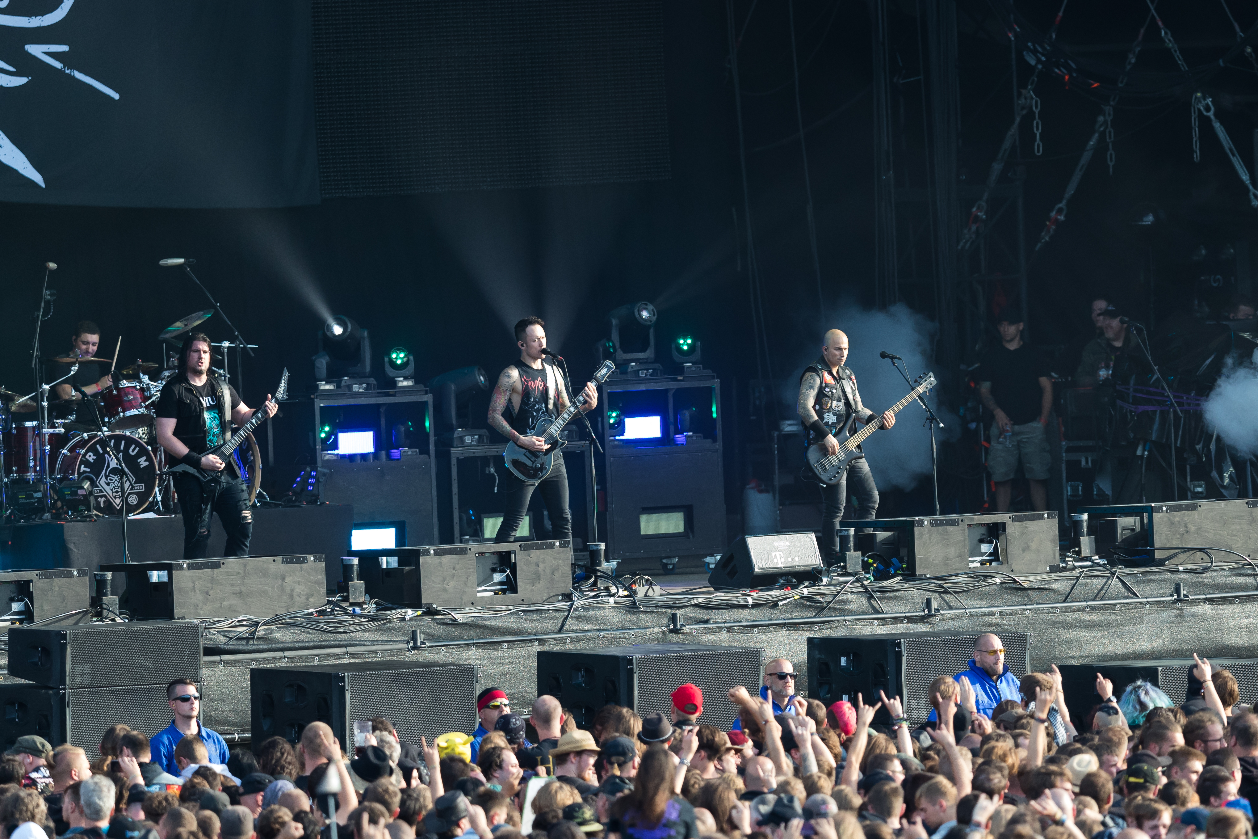 Trivium during Wacken Open Air at Schleswig-Holstein, Wacken, , Germany on 2017-08-04, Photo: Sven Mandel